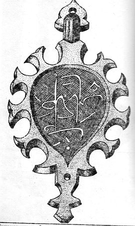 Бронзовая ручка из богатого дома в Маджаре (зарисовка)